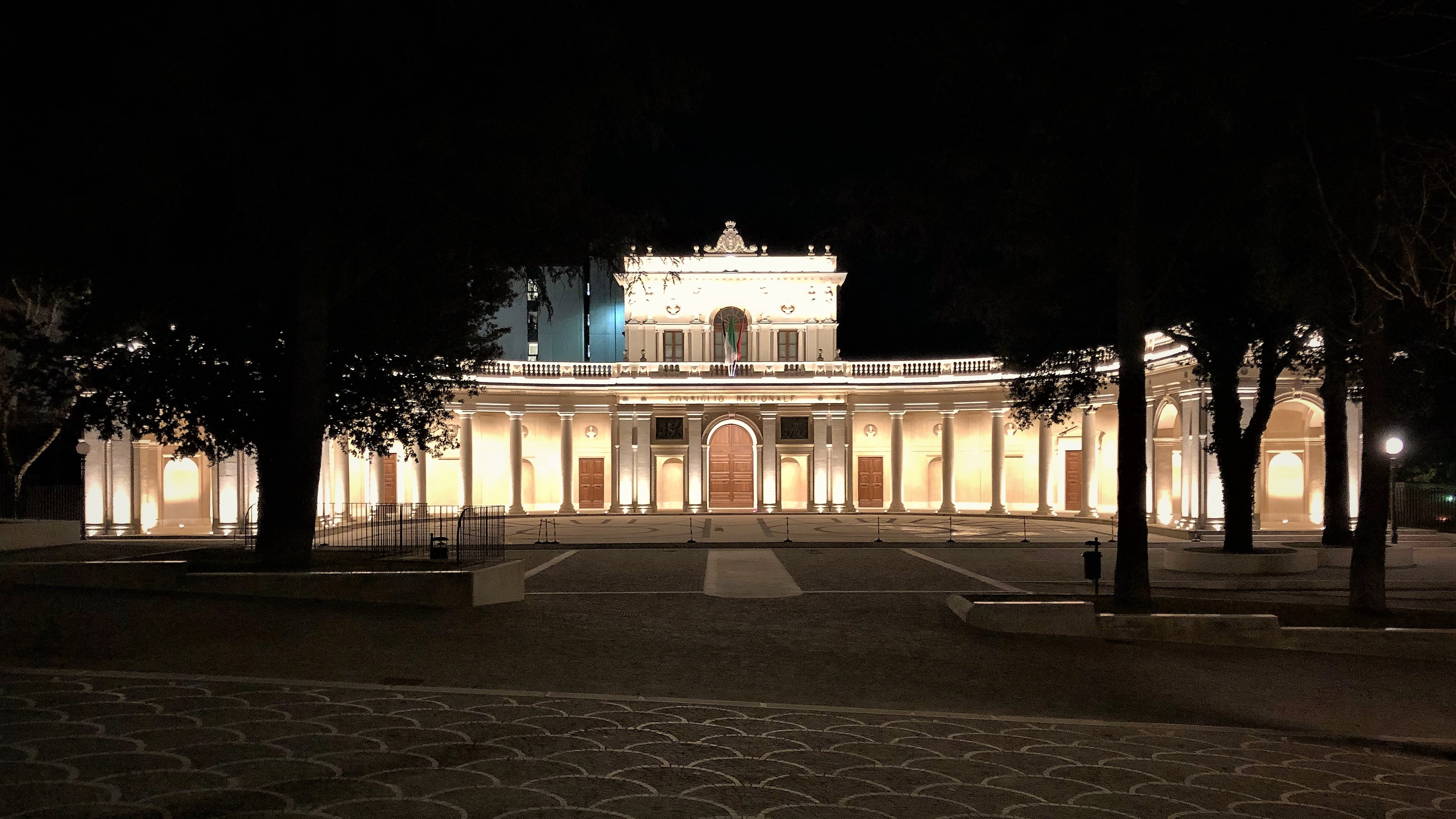 Facciata illuminata dell'Emiciclo in L'Aquila.